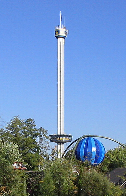 Der Euro-Tower im Europa-Park Rust